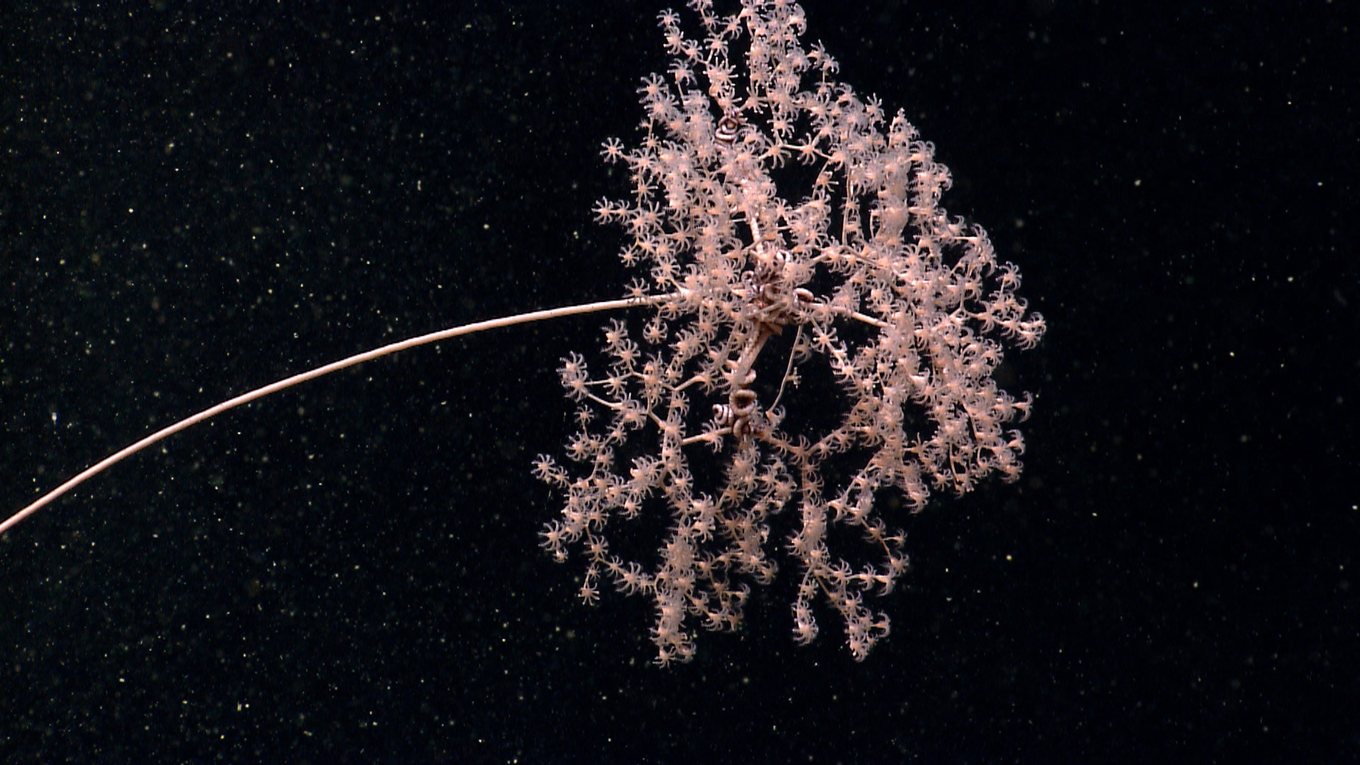 Metallogorgia melanotrichos y ofiuro Ophiocreas oedipus. Expedición 2013, NOAA Okeanos Explorer Program